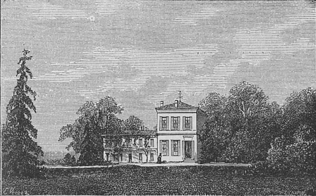 Illustration du Château Saint-Pierre dans l'ouvrage Bordeaux et ses vins (6ème édition) de Charles Cocks et Edouard Féret publié en 1893